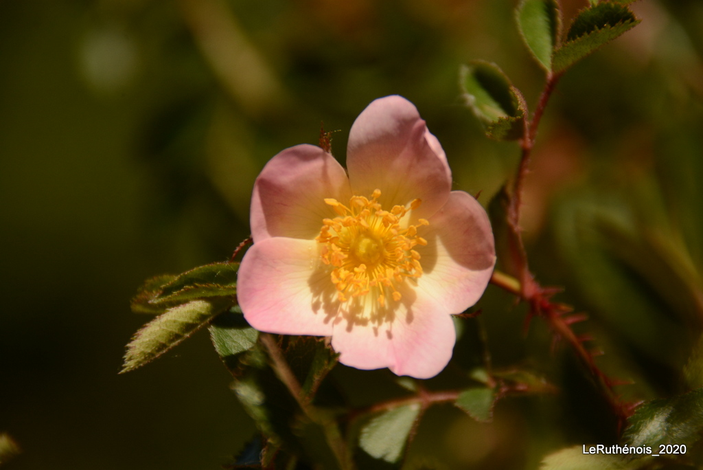 Rosa x aveyronensys, nouvelle tige avec des aiguillons peu courbés